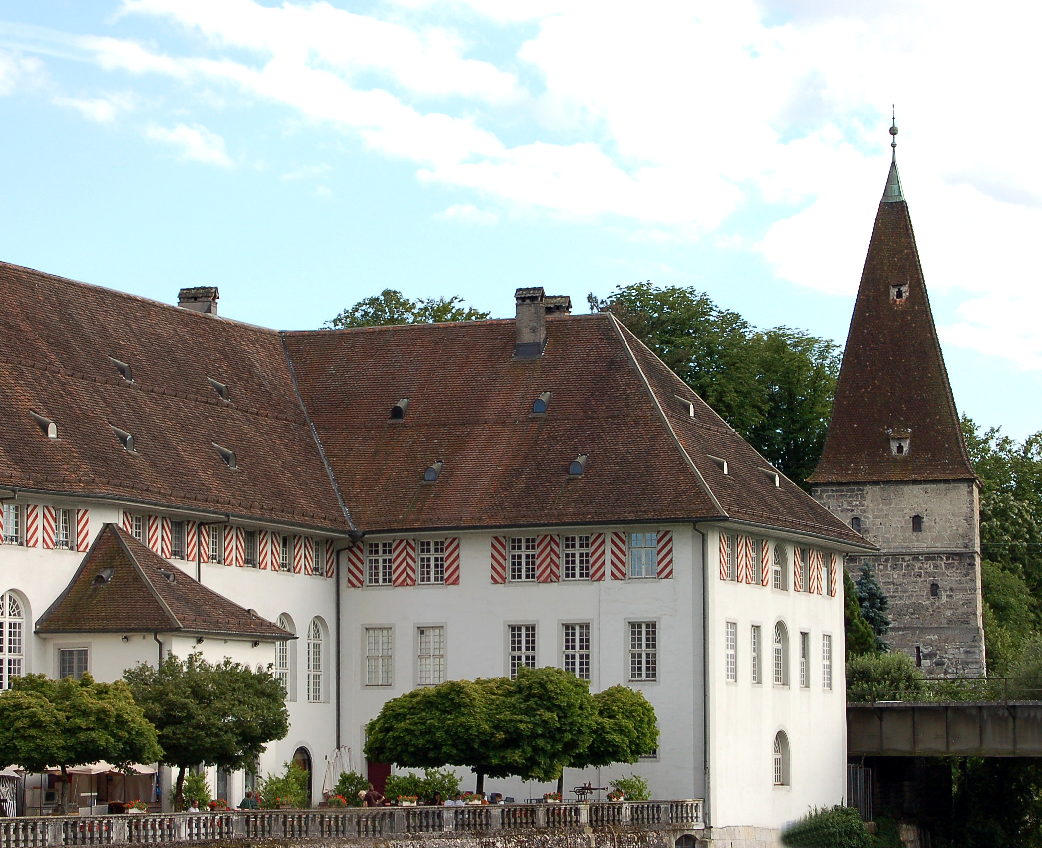 Krummer Turm, Solothurn